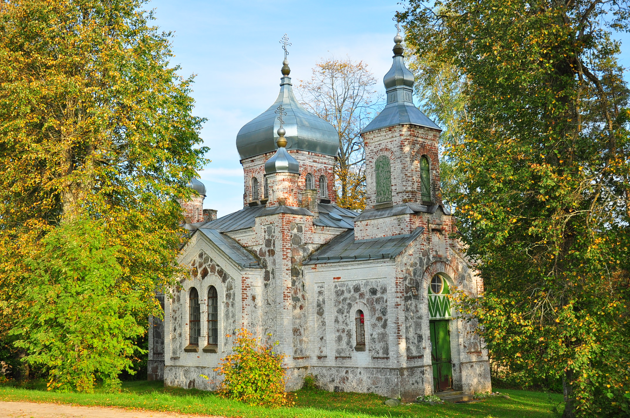 Nõo õigeusu kirik